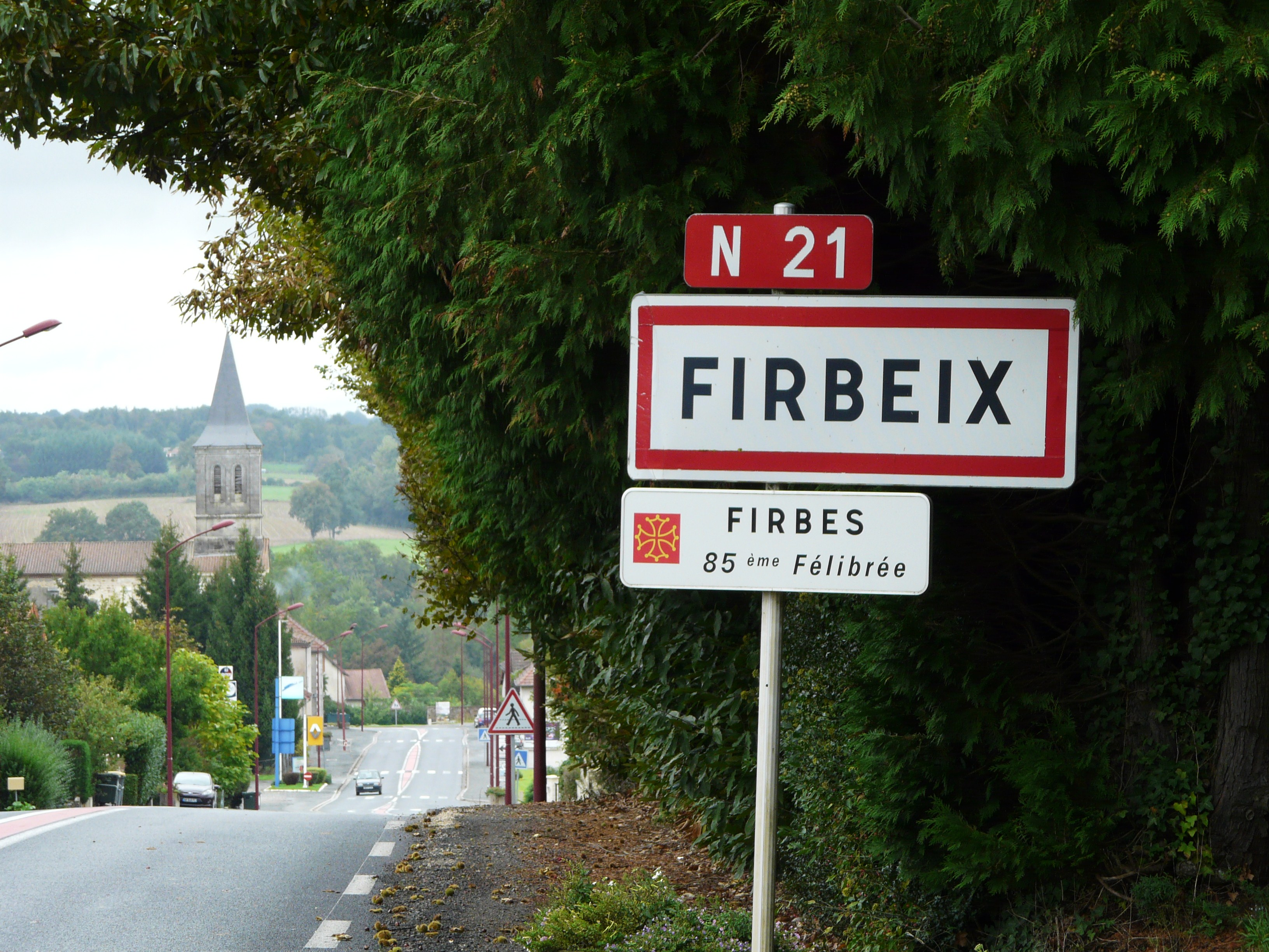 Panneau d'entrée franco-occitan à Firbeix, Dordogne, France.